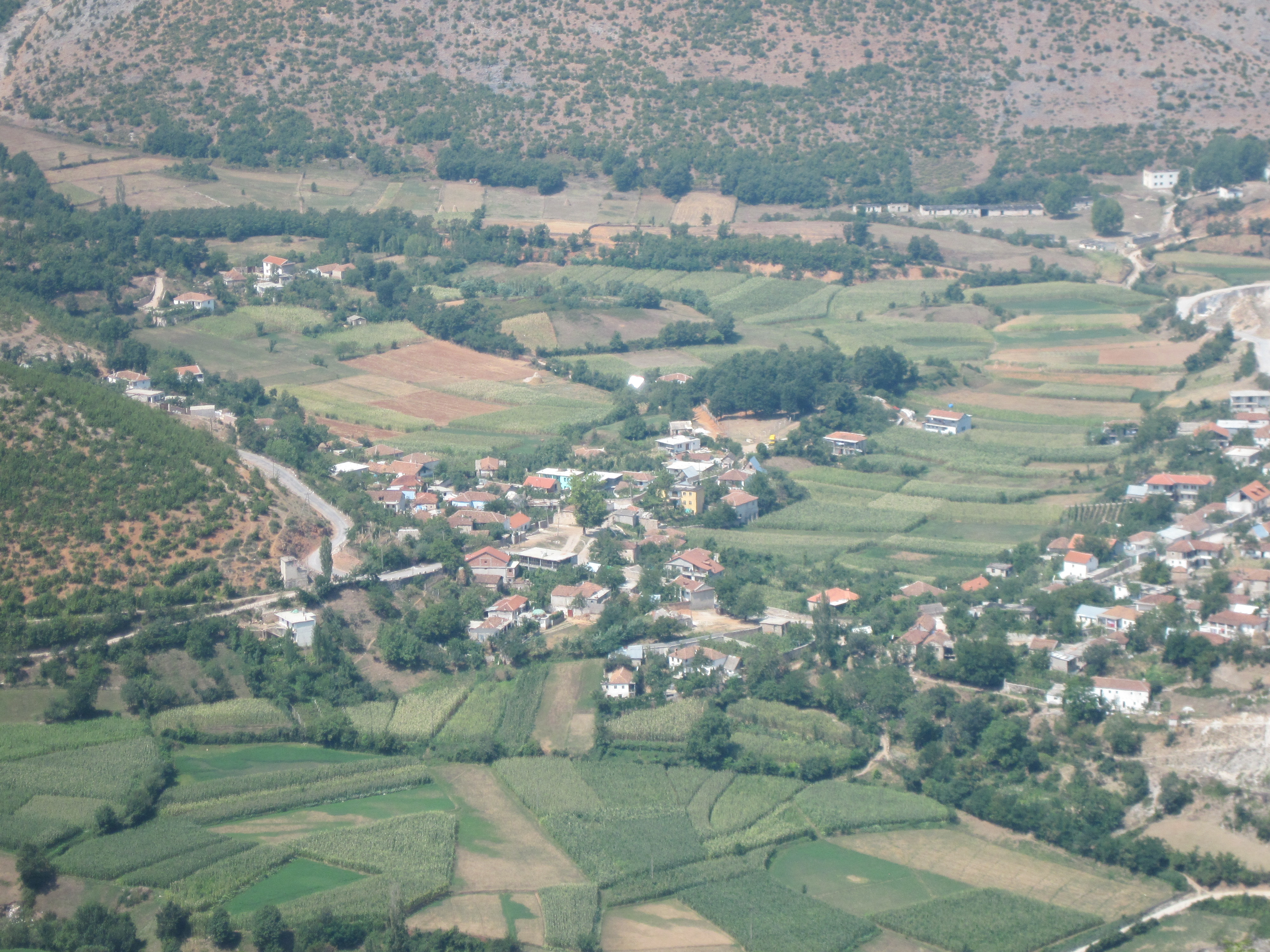 Fshati Osmanaj fotografuar nga rrasa e Shkalles se Keqe